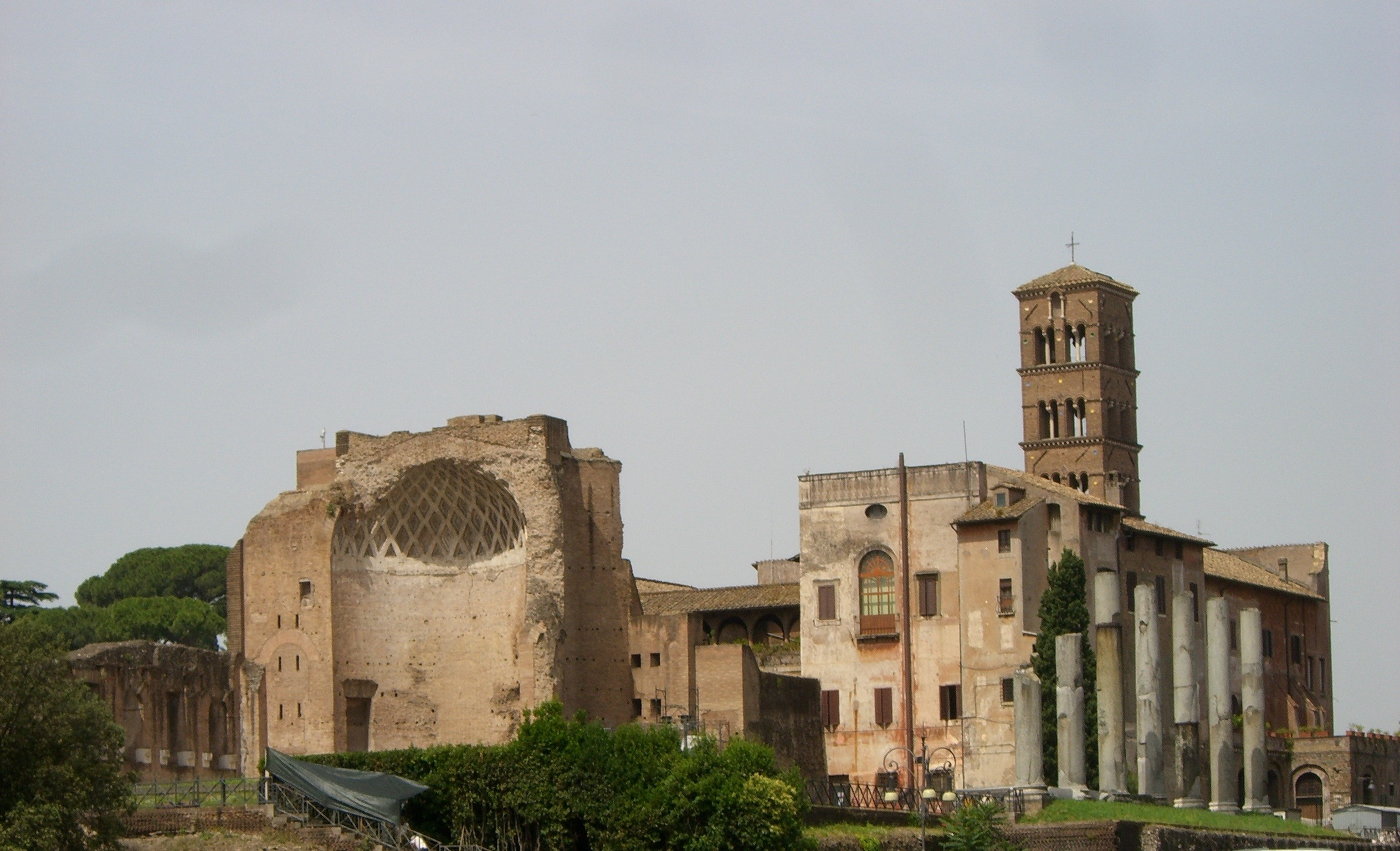 Tempel der Venus und der Roma und Basilica di Santa Francesca Romana, Rom